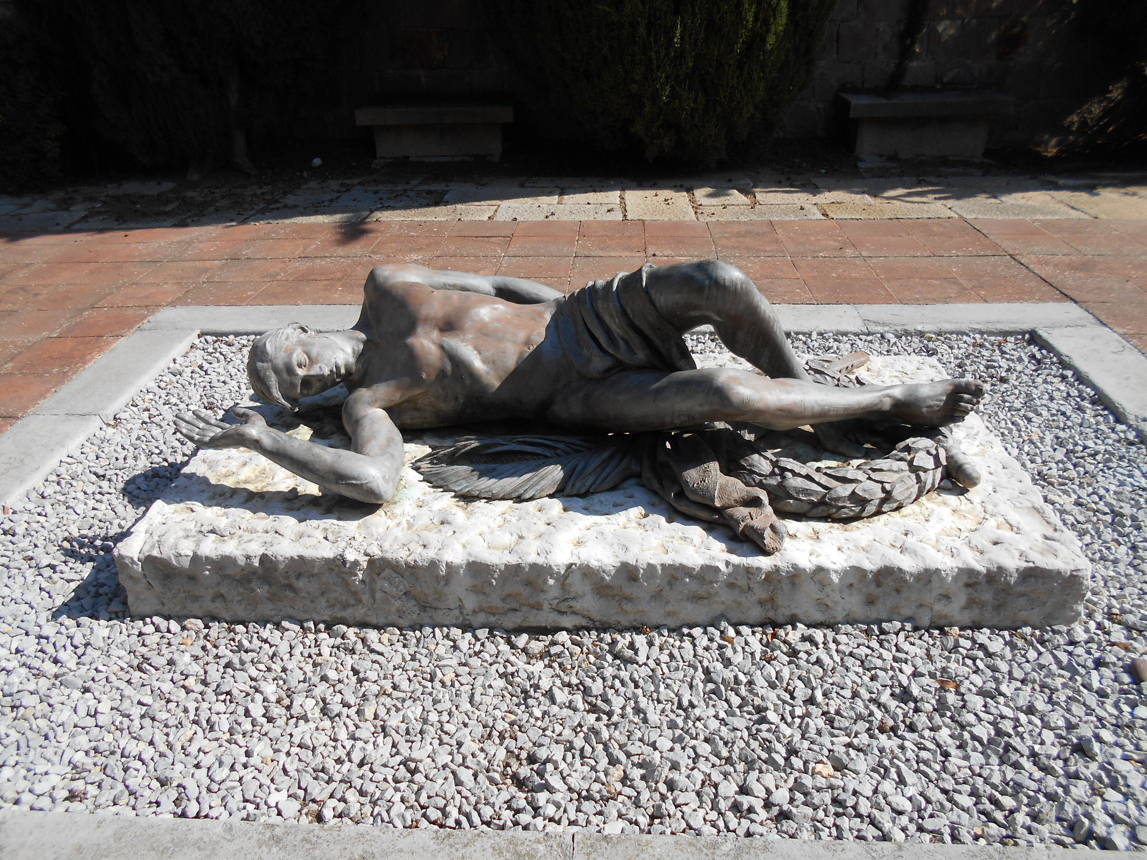 Escultura del Monumento a los Caídos, Foso de Santa Elena, Castillo de Montjuïc, Barcelona. Obra de los Hermanos Miquel y Llucià Oslé (1940).